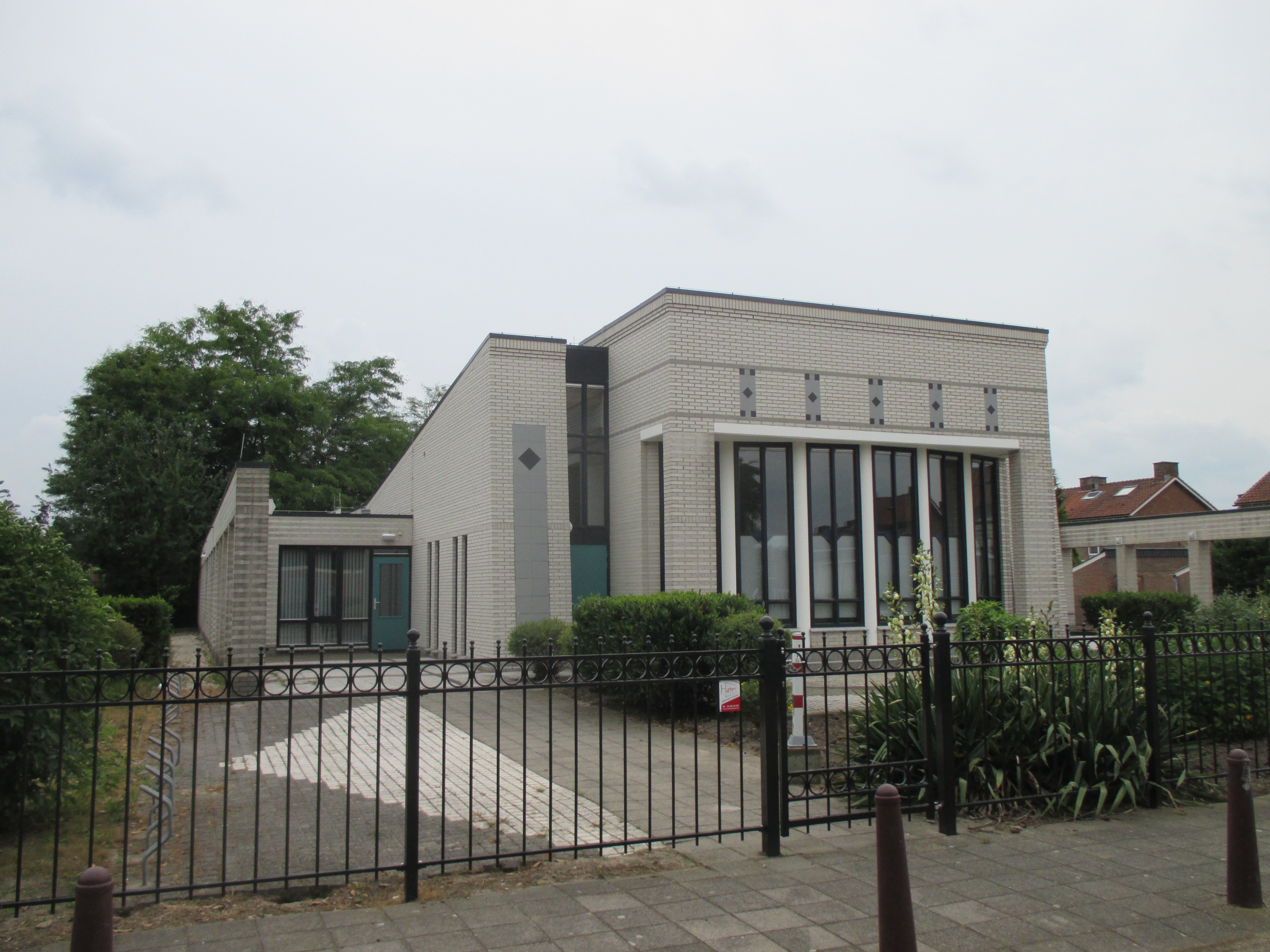 Moluks Evangelische Pniel kerk te Opheusden na herstel